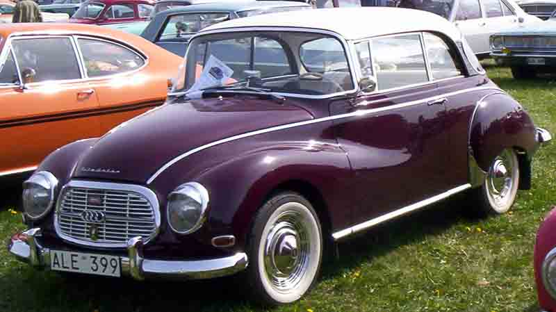 DKW AU1000 S Coupé 1963